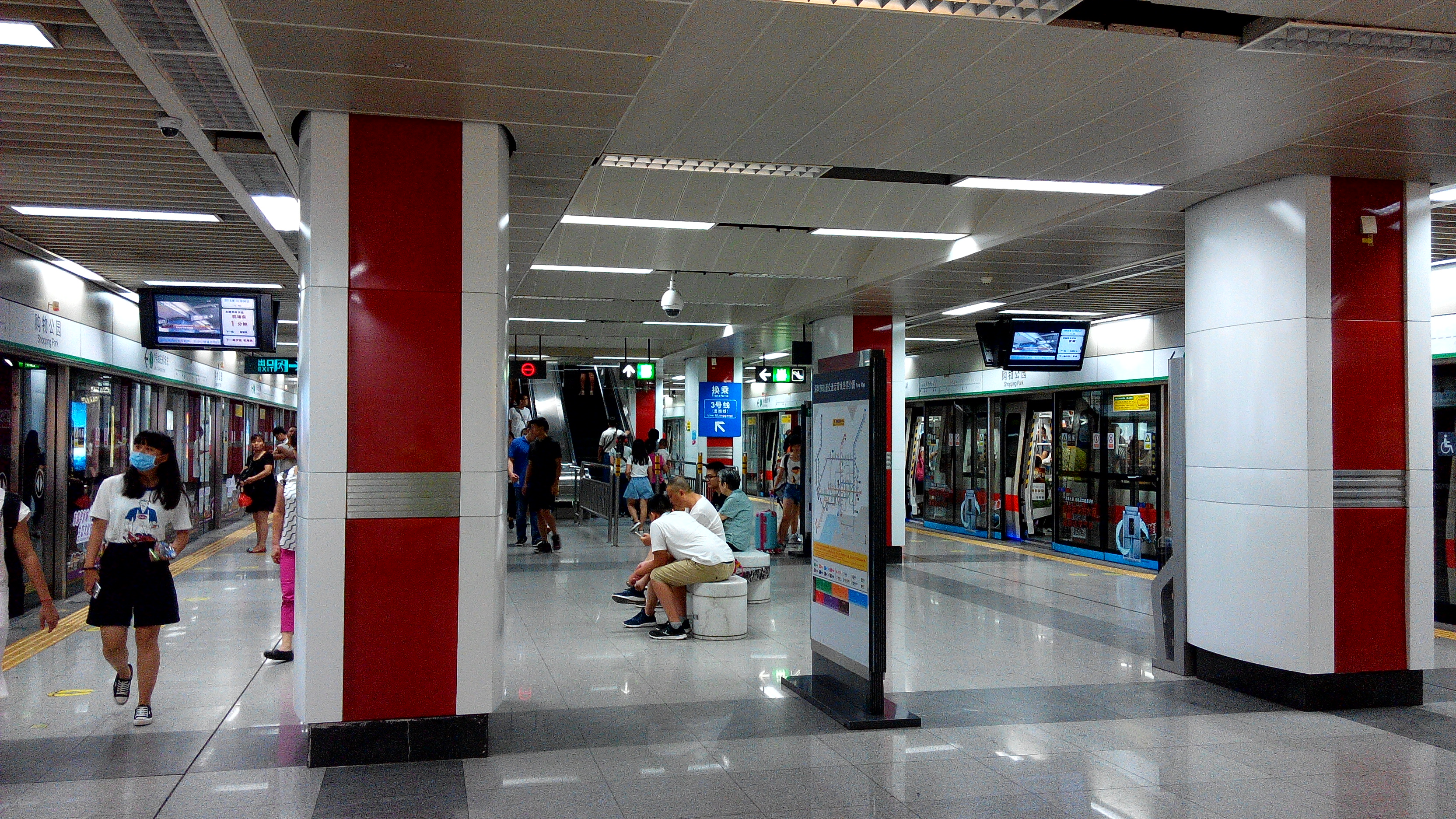 深圳地铁一号线 购物公园站站台